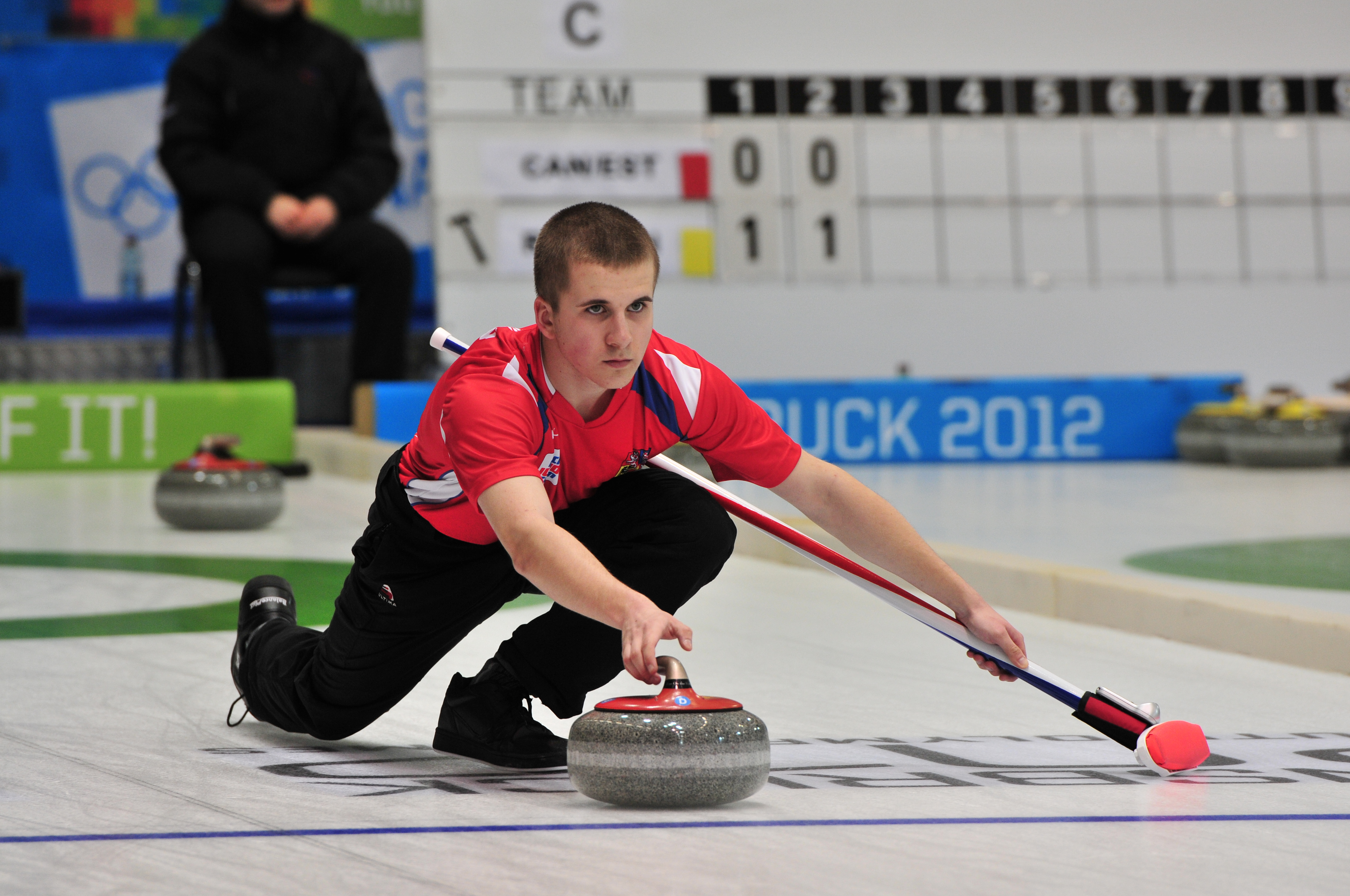 1. Jugendolympiade 2012 Innsbruck Erste Olympische Jugend- Winterspiele 201213. bis 22. Jänner in Innsbruck Dieses Foto wurde durch die Unterstützung von Wikimedia Österreich und die Twoonix Software GmbH ermöglicht.